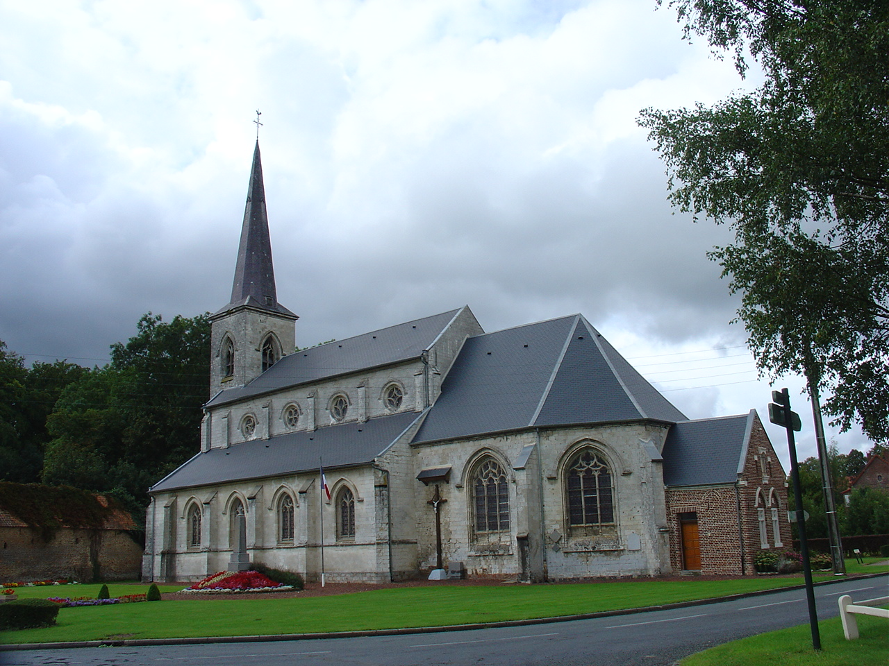 Église de Vieil-Hesdin